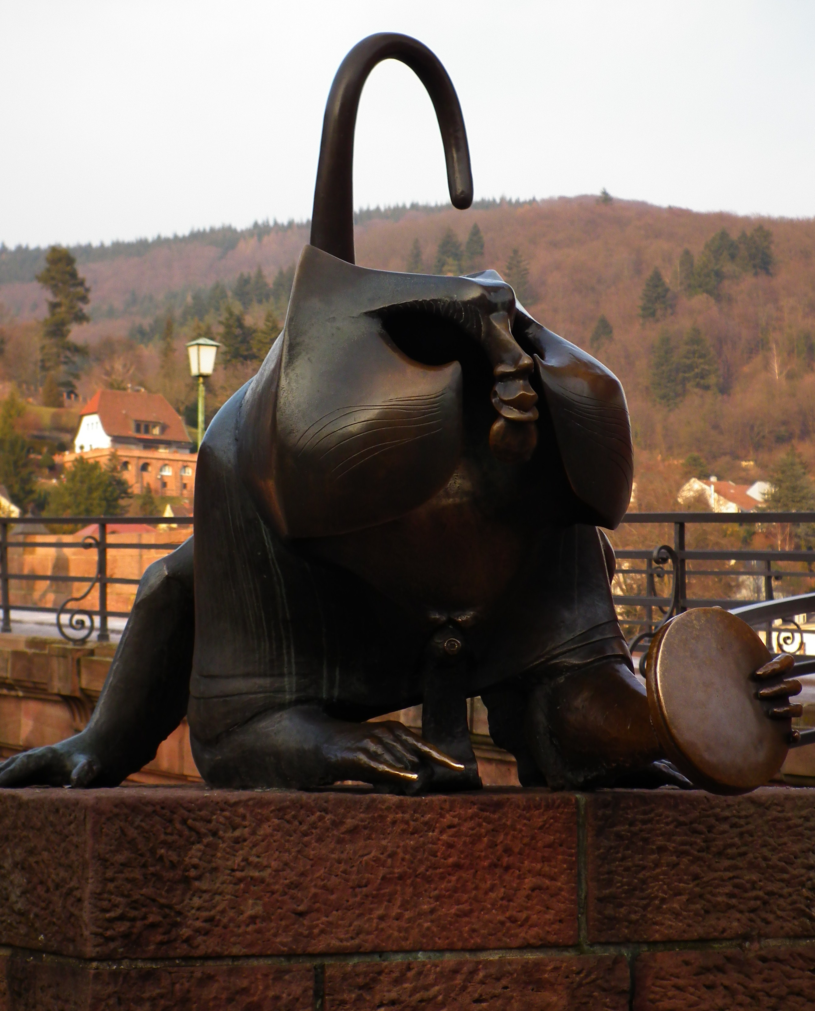 Brückenaffe an der Alten Brücke in der Heidelberger Altstadt (Baden-Württemberg, Deutschland)